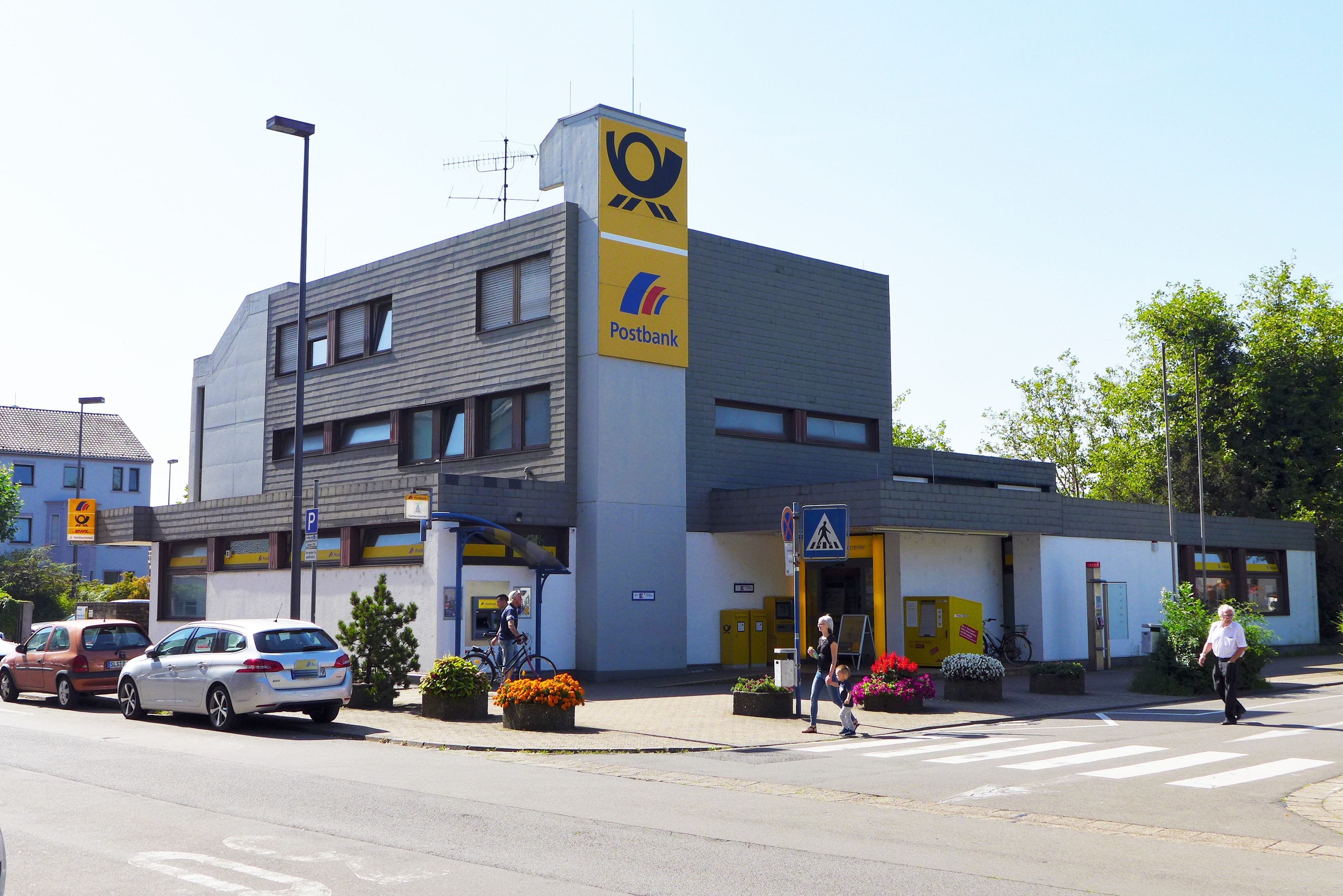 Dillingen/Saar, Post